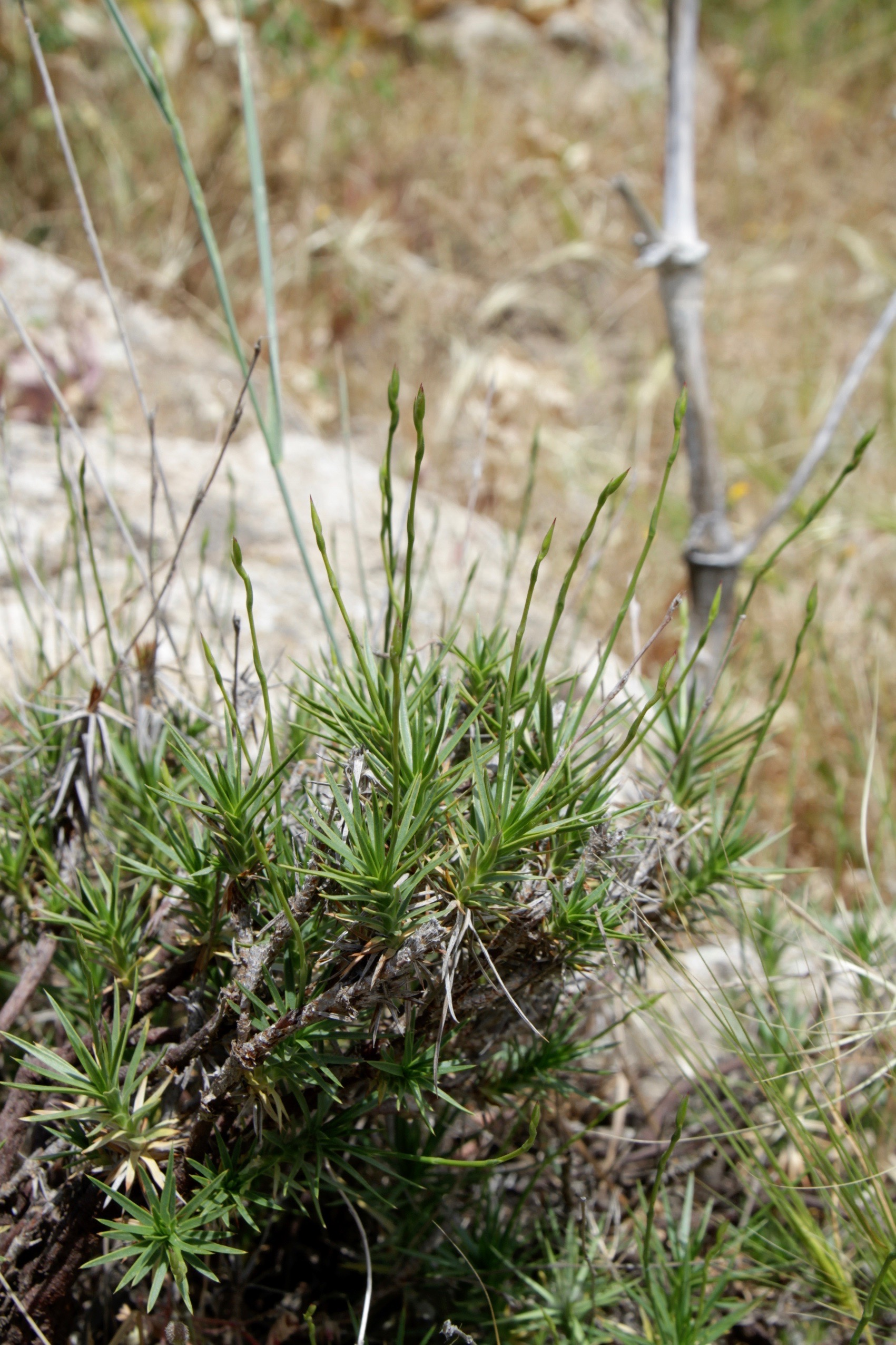 Uzbekistan, Gissar-Alai, Takhtakaracha pass, 1660m